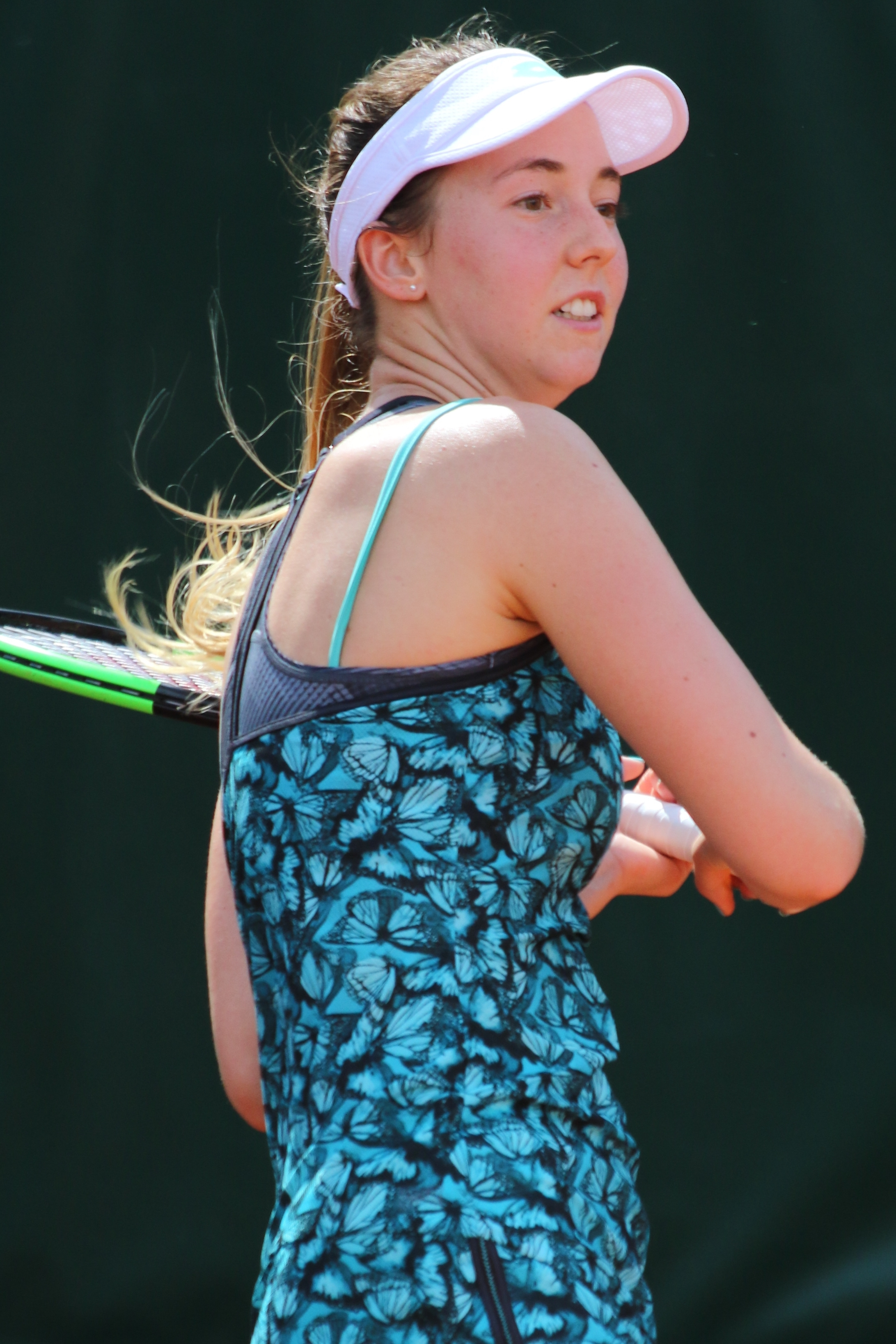 Stojanovic RG18 (8)